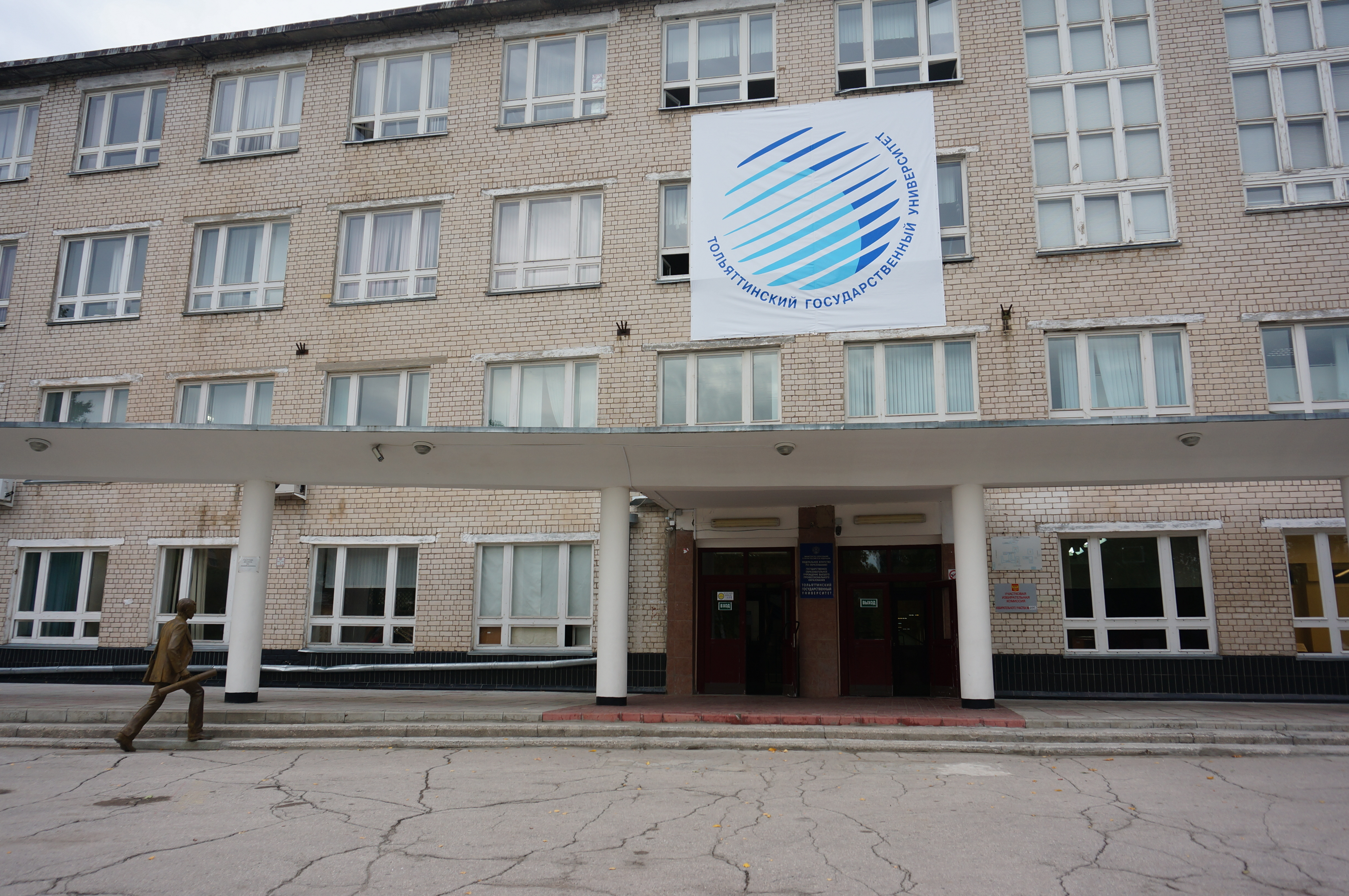 Одно из зданий Тольяттинского государственного университета. Виден памятник студенту, спешащему на занятия